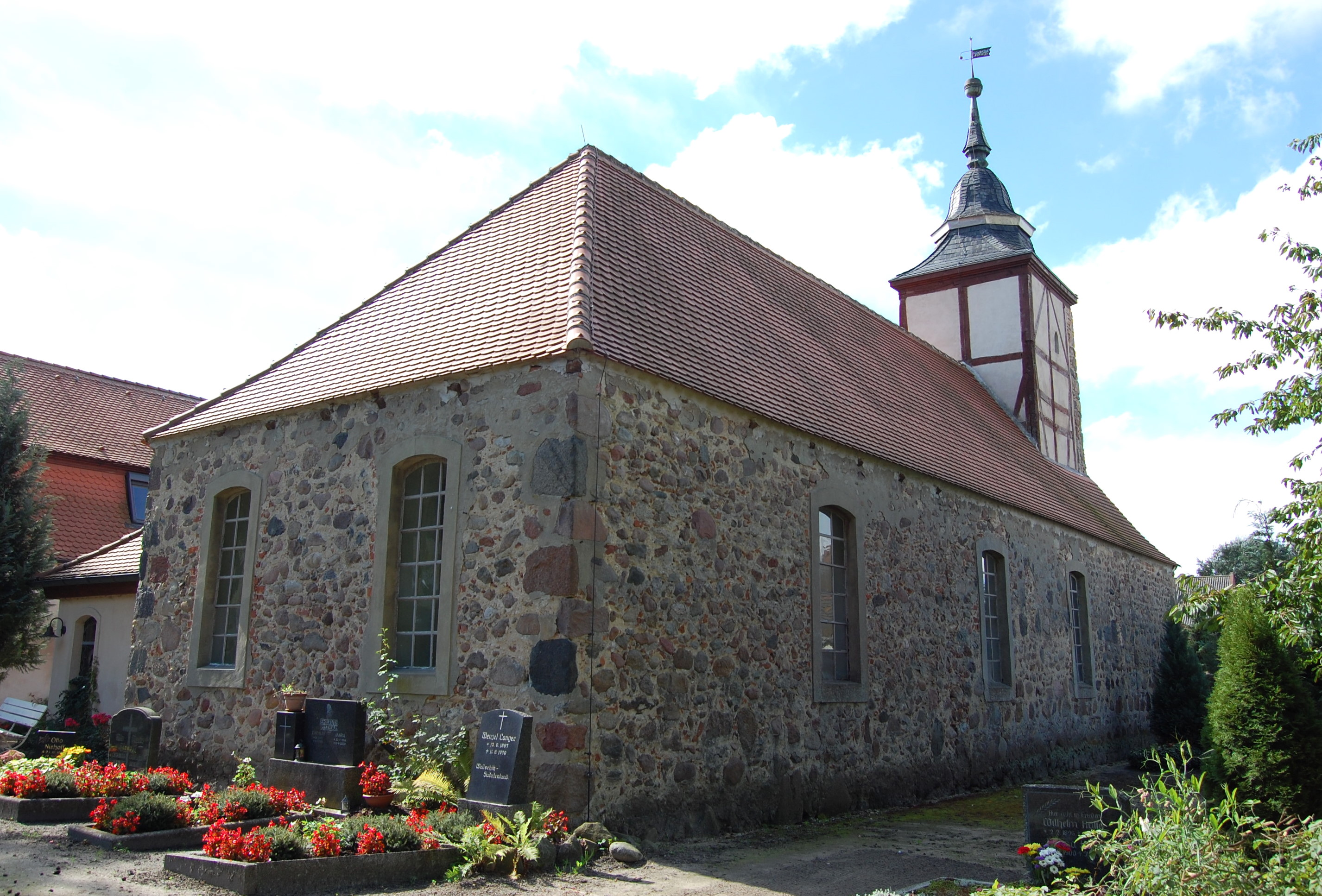 Schiff der Dorfkirche Döbbelin